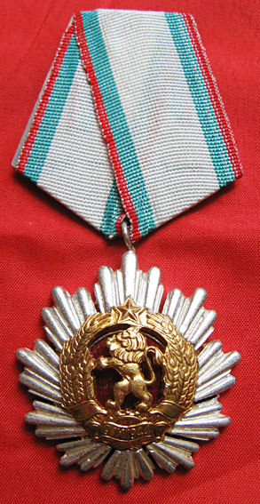 орден „Народна Република България“ II ст.